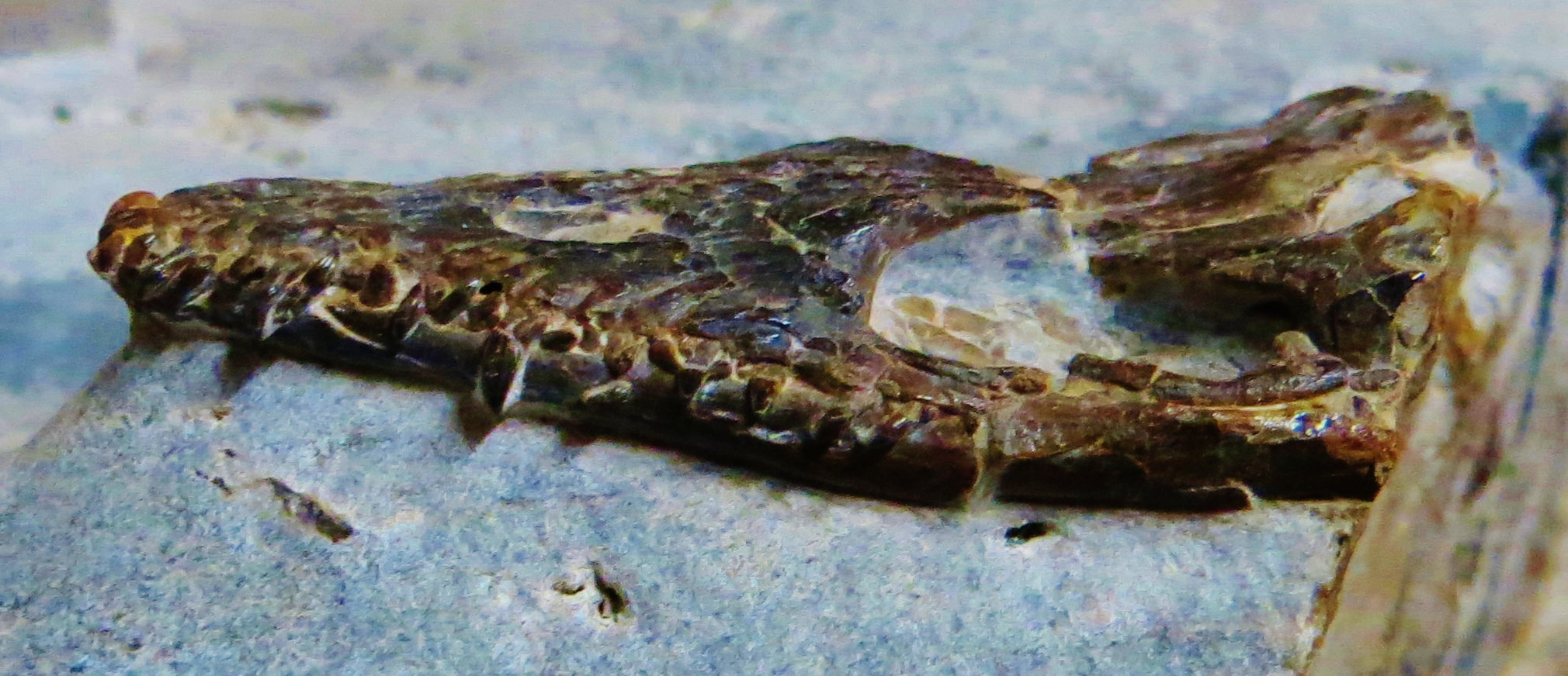 Fossil of Odoiporosaurus, an extinct reptile - Took the picture at Museo di Storia Naturale di Milano